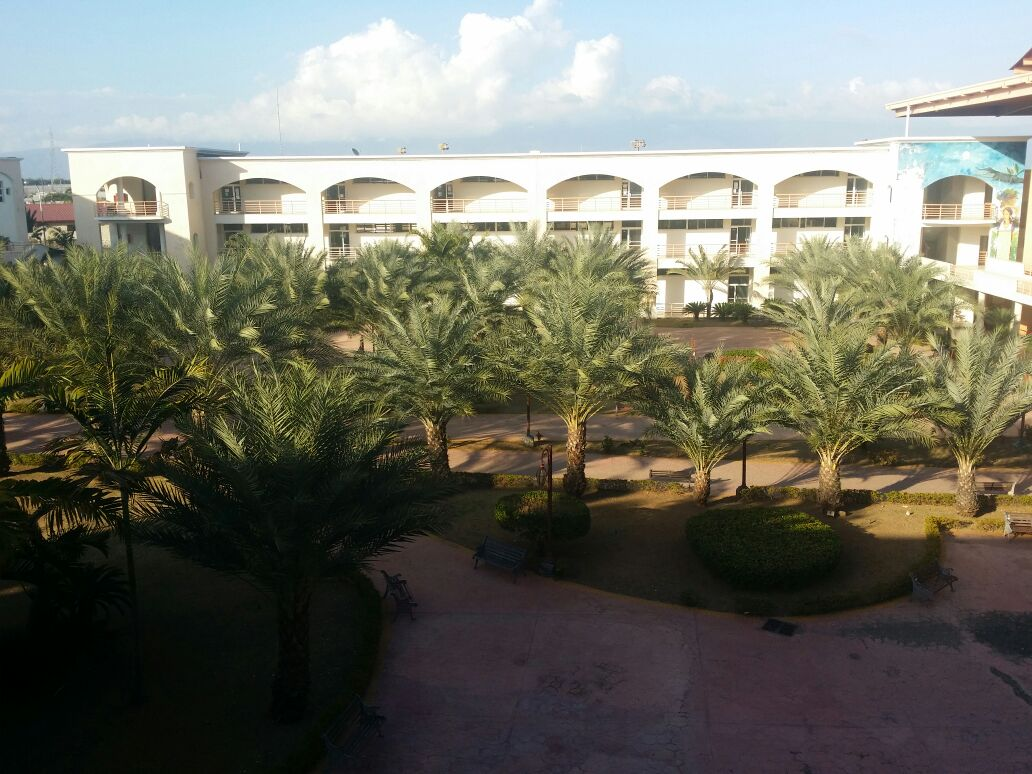 Universidad Autónoma de Santo Domingo